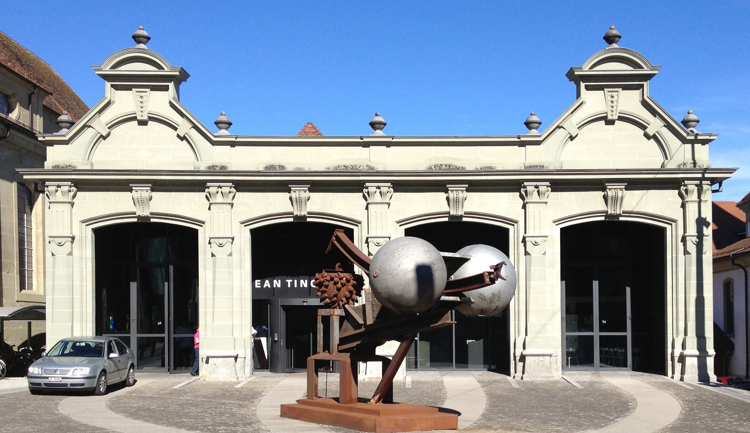 L'Espace Jean Tinguely / Niki de Saint-Phalle à Fribourg, en Suisse.